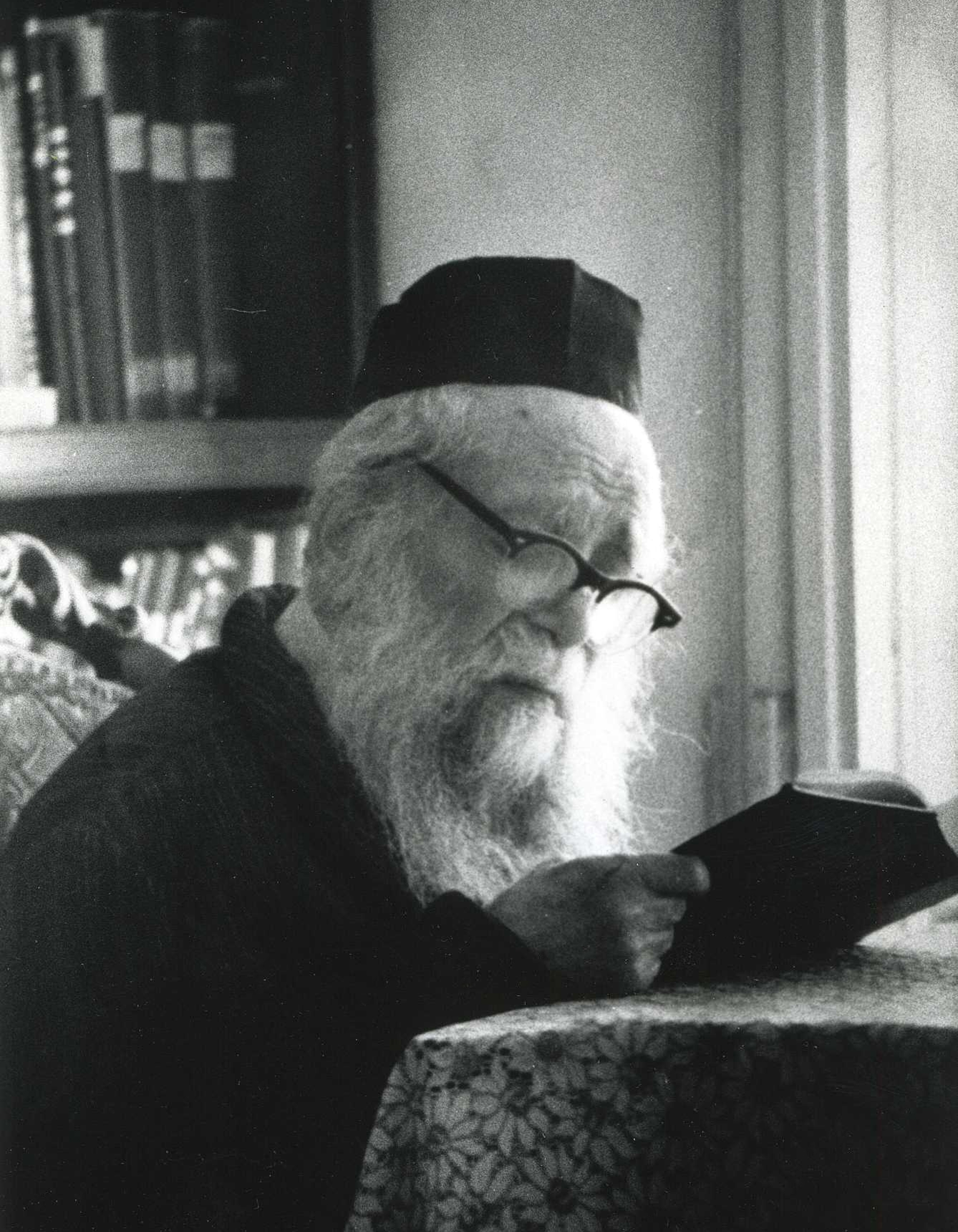 הרב מאיר חדש